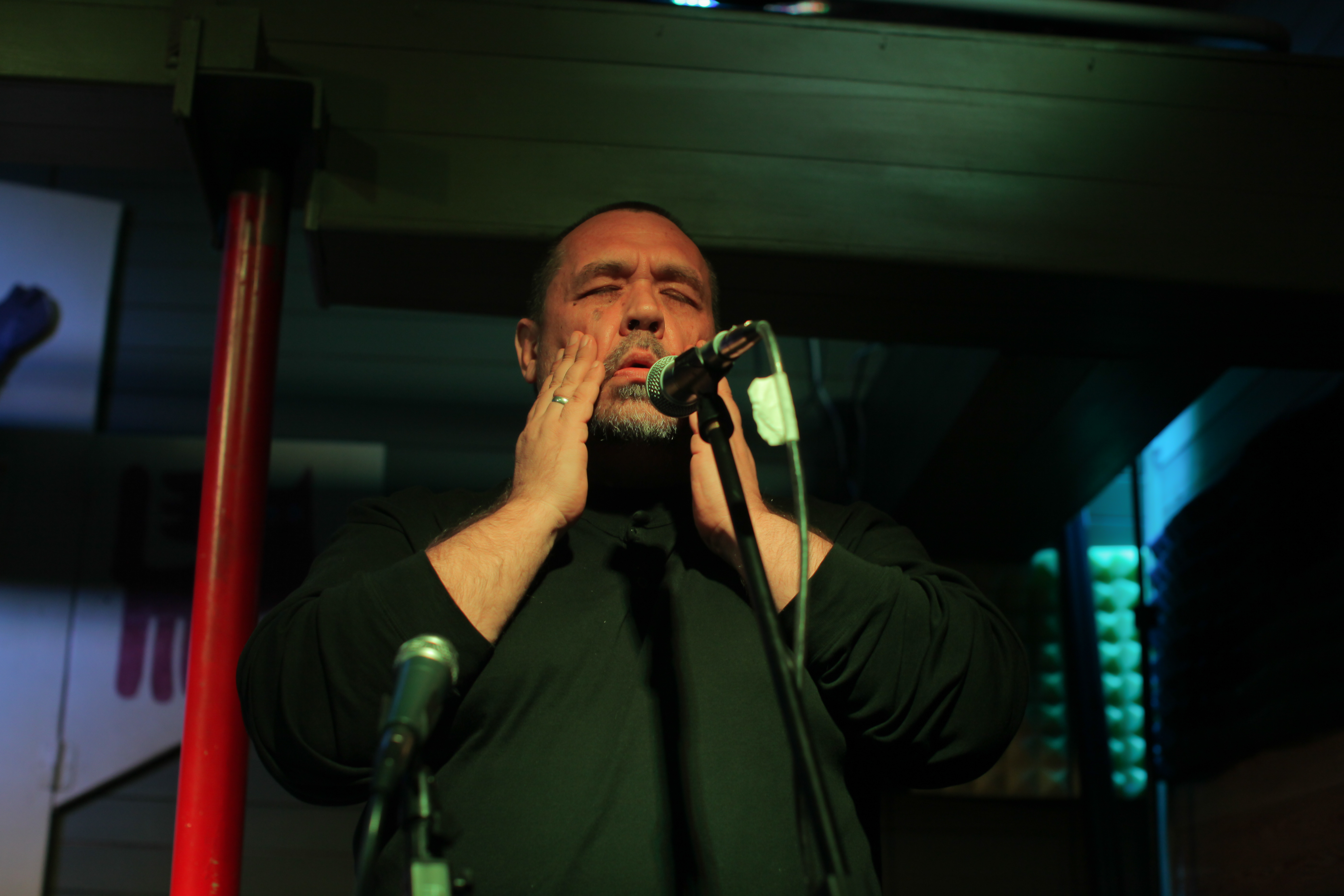 Поэт и музыкант Дмитрий Озерский